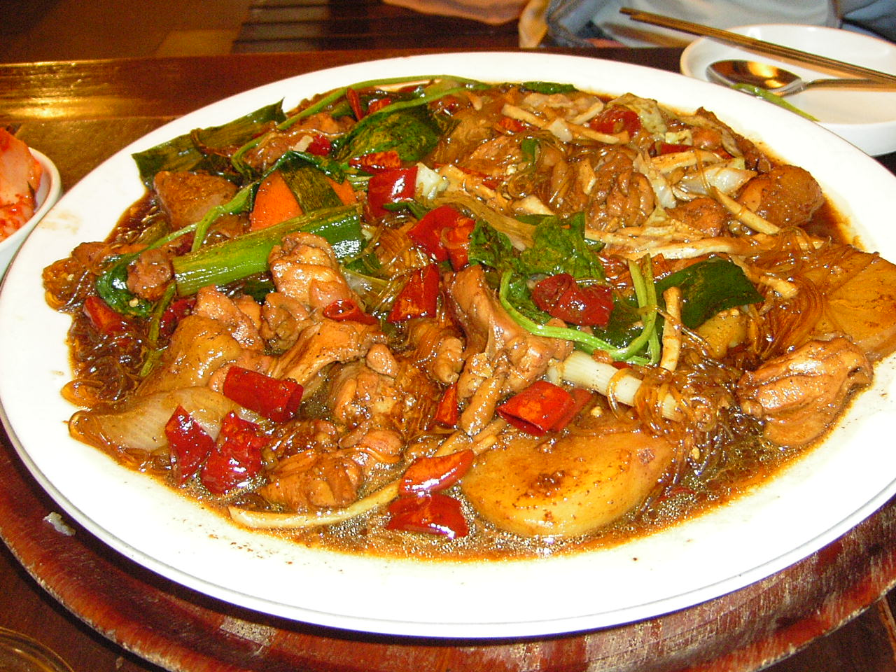 Andong.jjimdalk in Korean cuisine